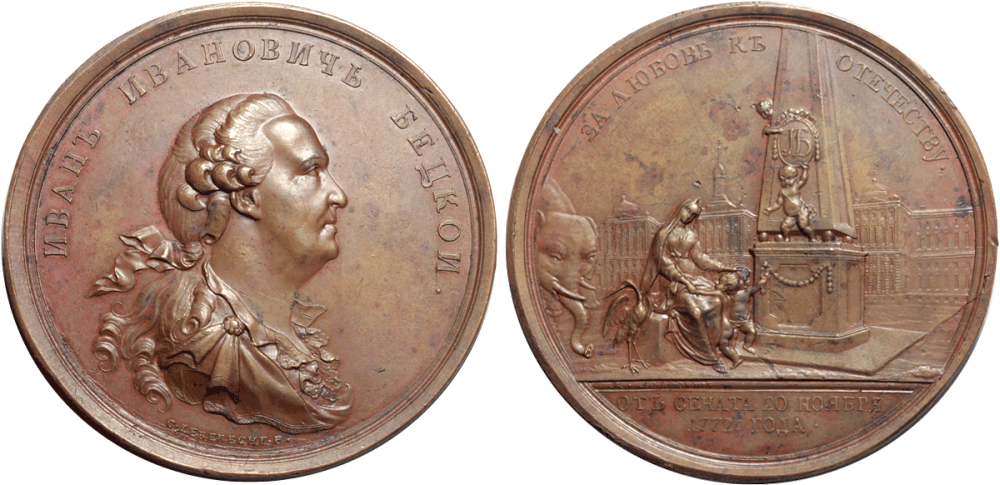 Медаль сената, отчеканенная в честь Ивана Ивановича Бецкого в 1772 году. Гравер К. Леберехт. Медь.